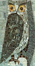 Naturstein-Mosaik von Franz K. Opitz (Schweizer Künstler 1916 - 1998) Schweiz.